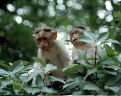 Macaca radiata Jeunes macaques à bonnet en milieu naturel. Photographie de Bernard Thierry avec son aimable autorisation.